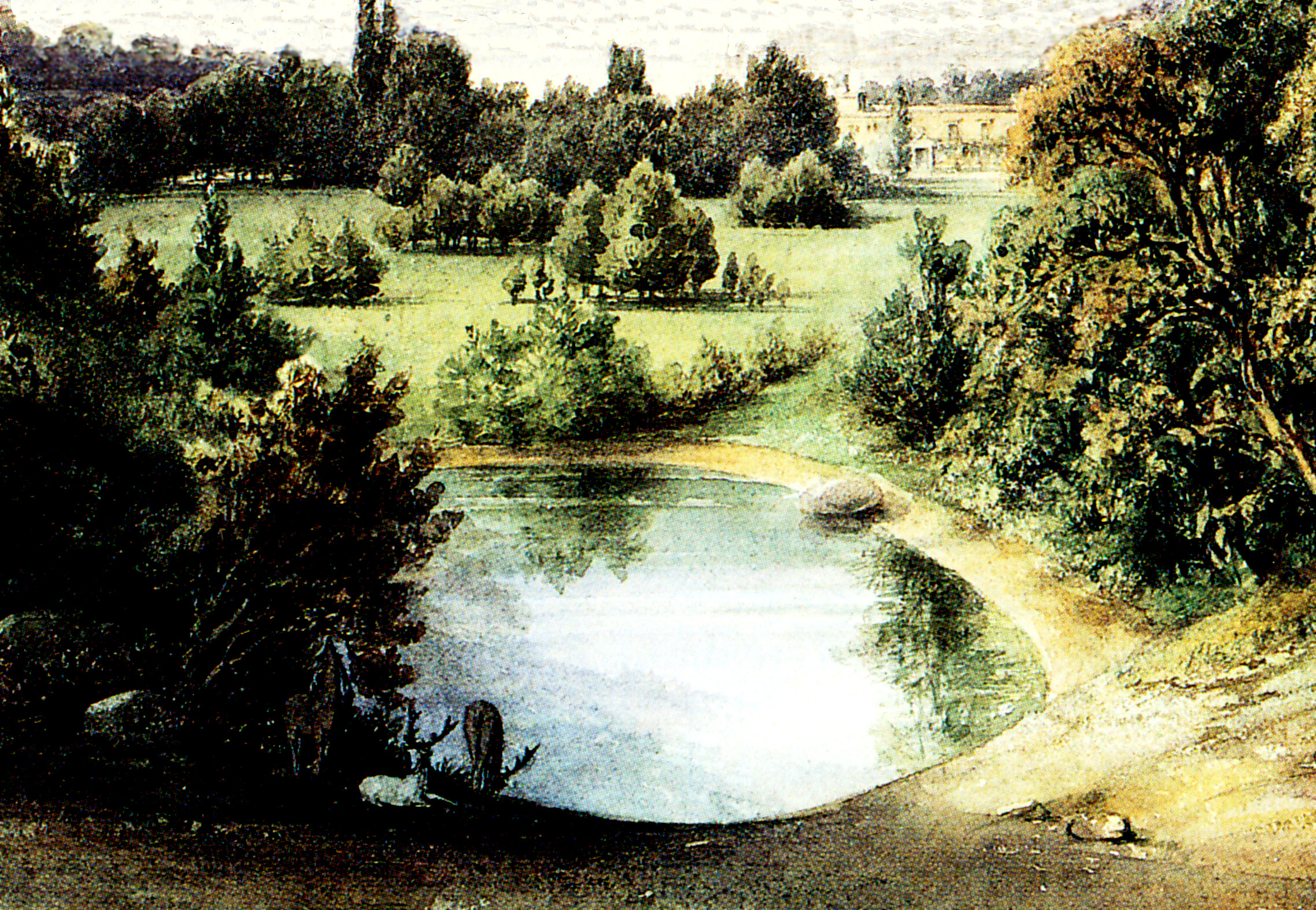 Der Große Wiesengrund